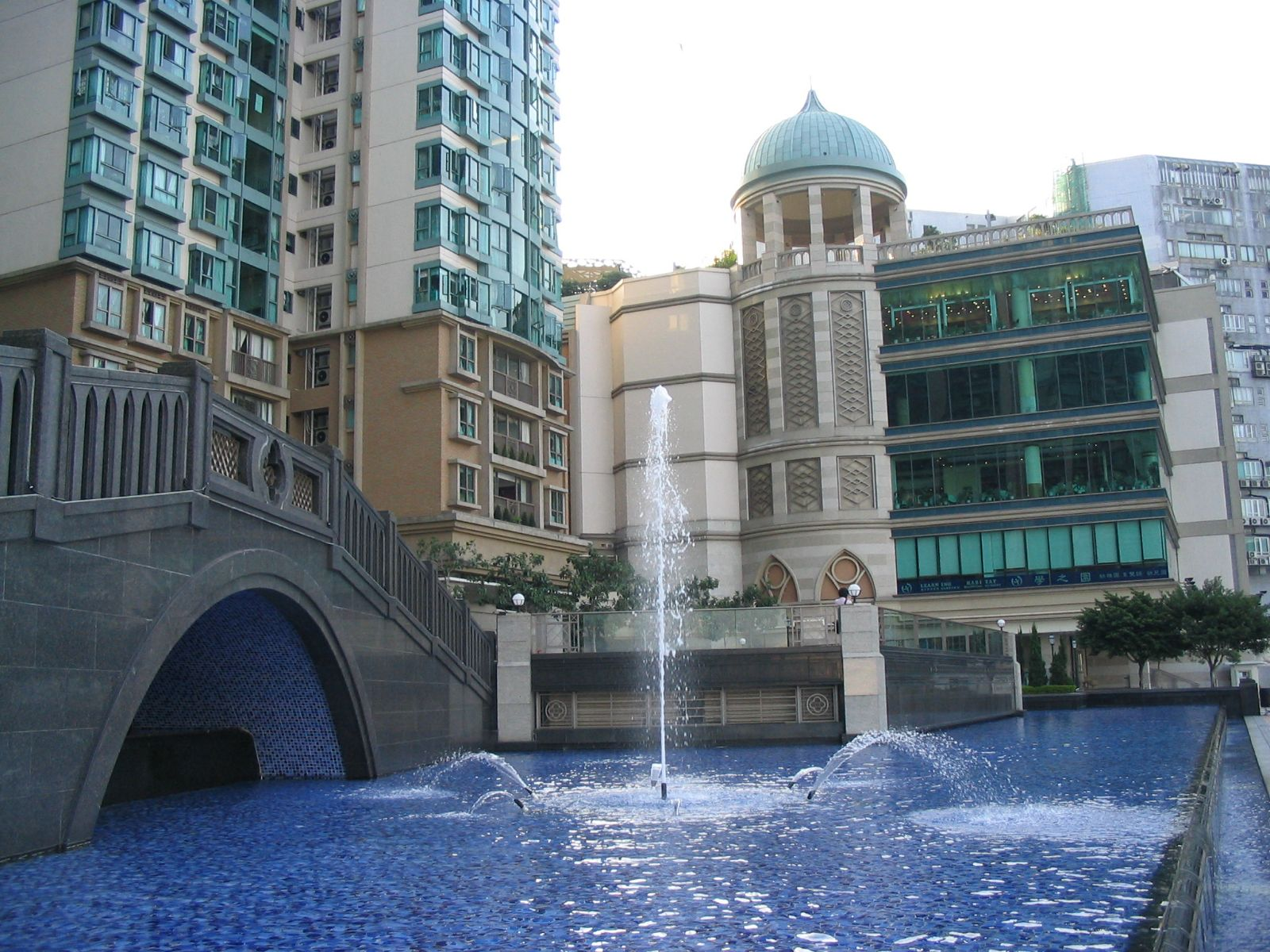 海逸豪園第八座（左）及漁人碼頭商場 Tower 8 (left) & Fisherman's Wharf, Laguna Verde